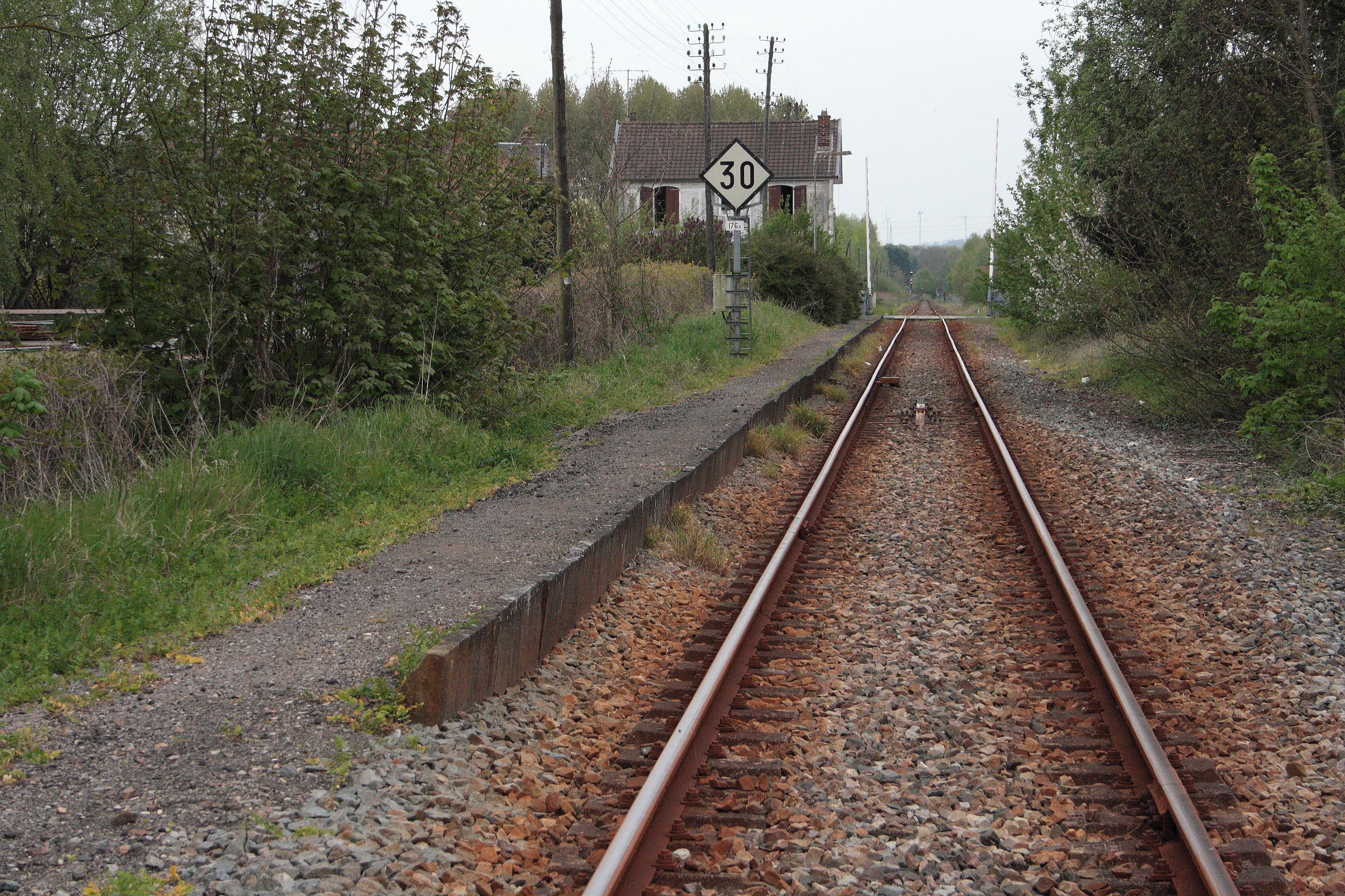 Ancienne gare ferroviaire de Faubourg-de-Rouvroy (quai et panneau "TIV 30").L'ancienne maison de garde-barrière, visible en arrière-plan, a été détruite le mardi 8 décembre 2015.